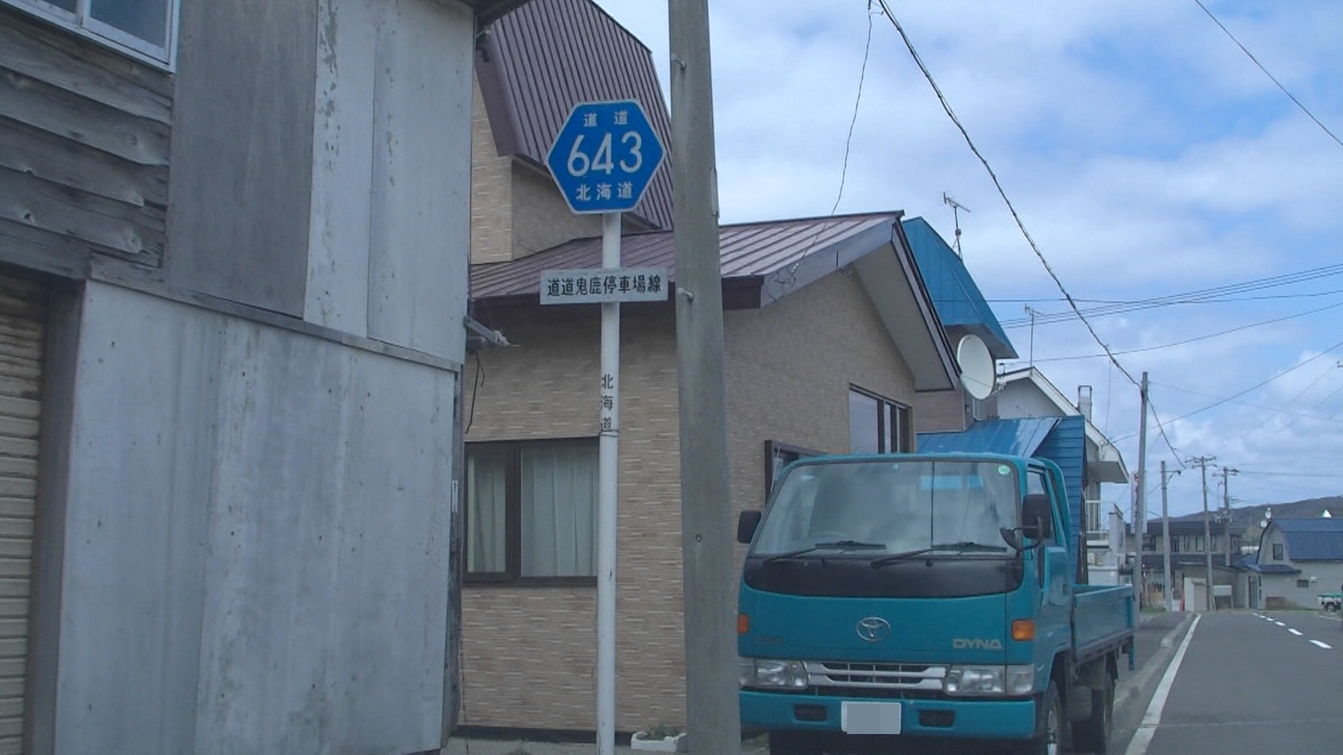 北海道道643号鬼鹿停車場線（起点付近の案内標識）